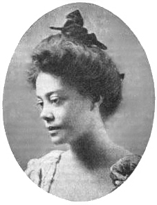 Alice Dunbar Nelson